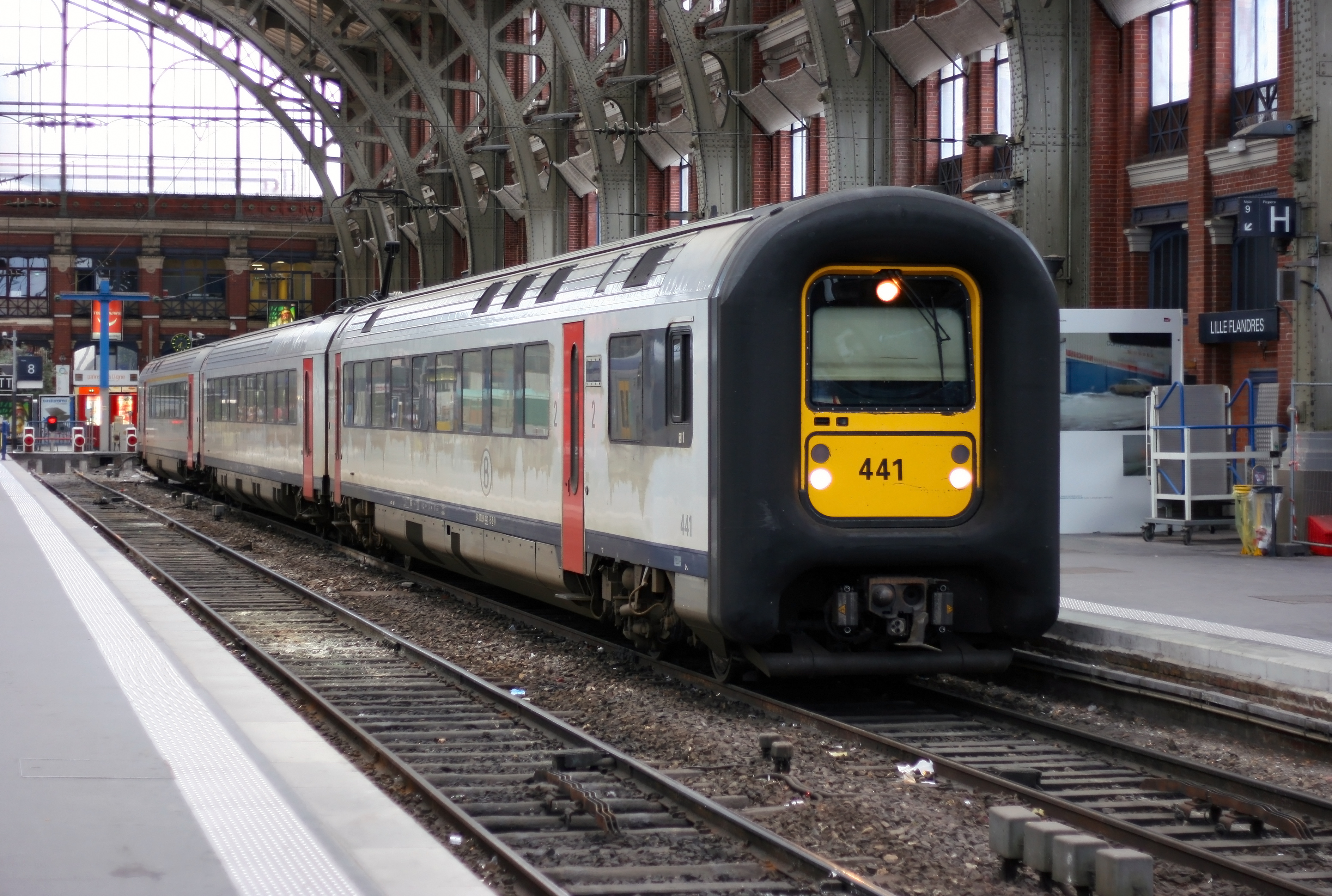 Wacht op vertrek terug in richting Antwerpen.